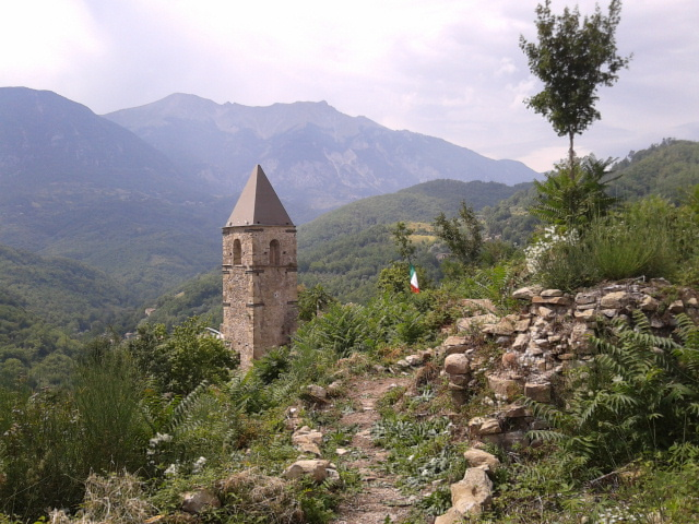 Campanile della distrutta chiesa di Santa Maria Bambina